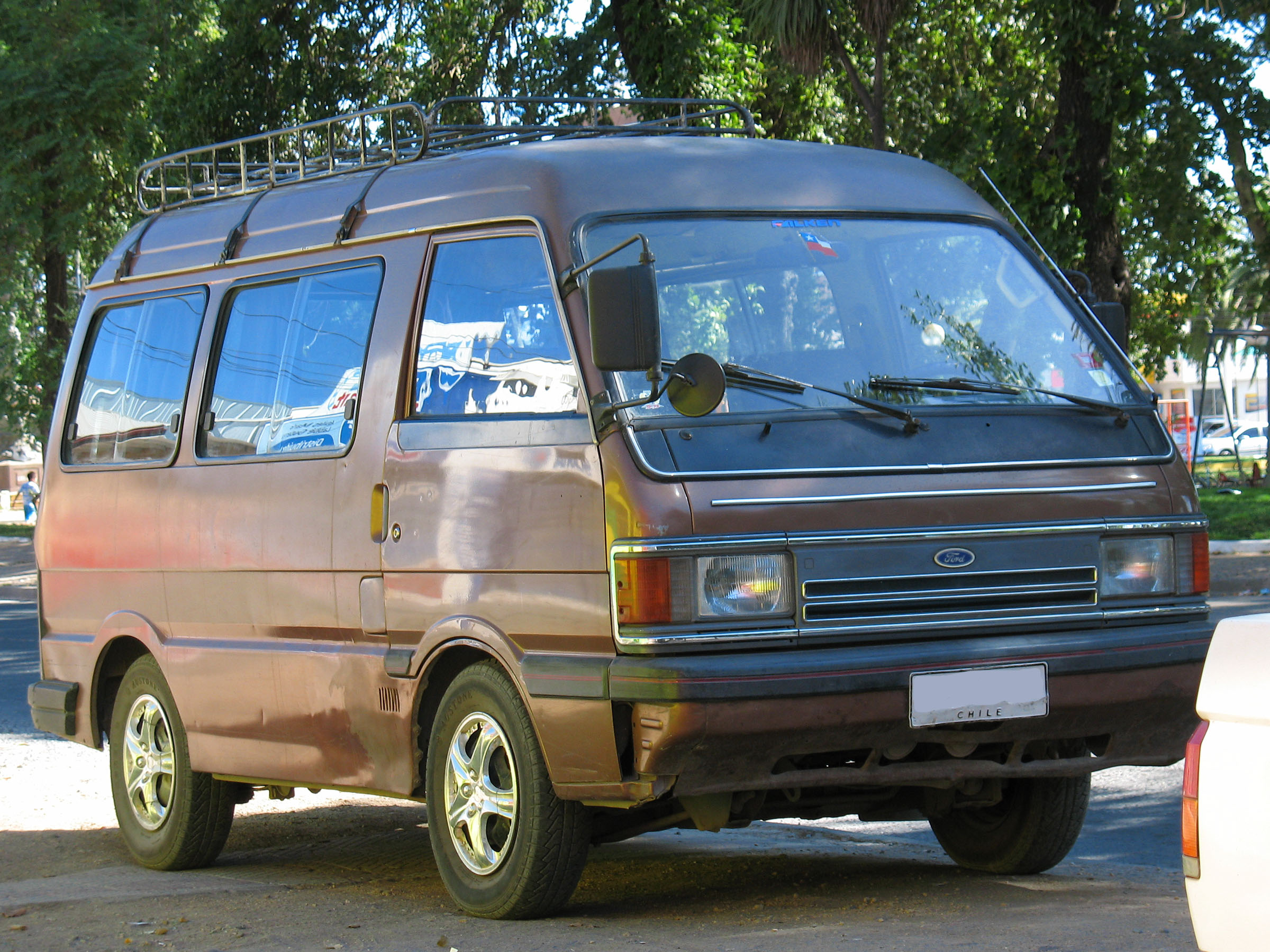 Ford Spectron 1.8 SWB van 1986